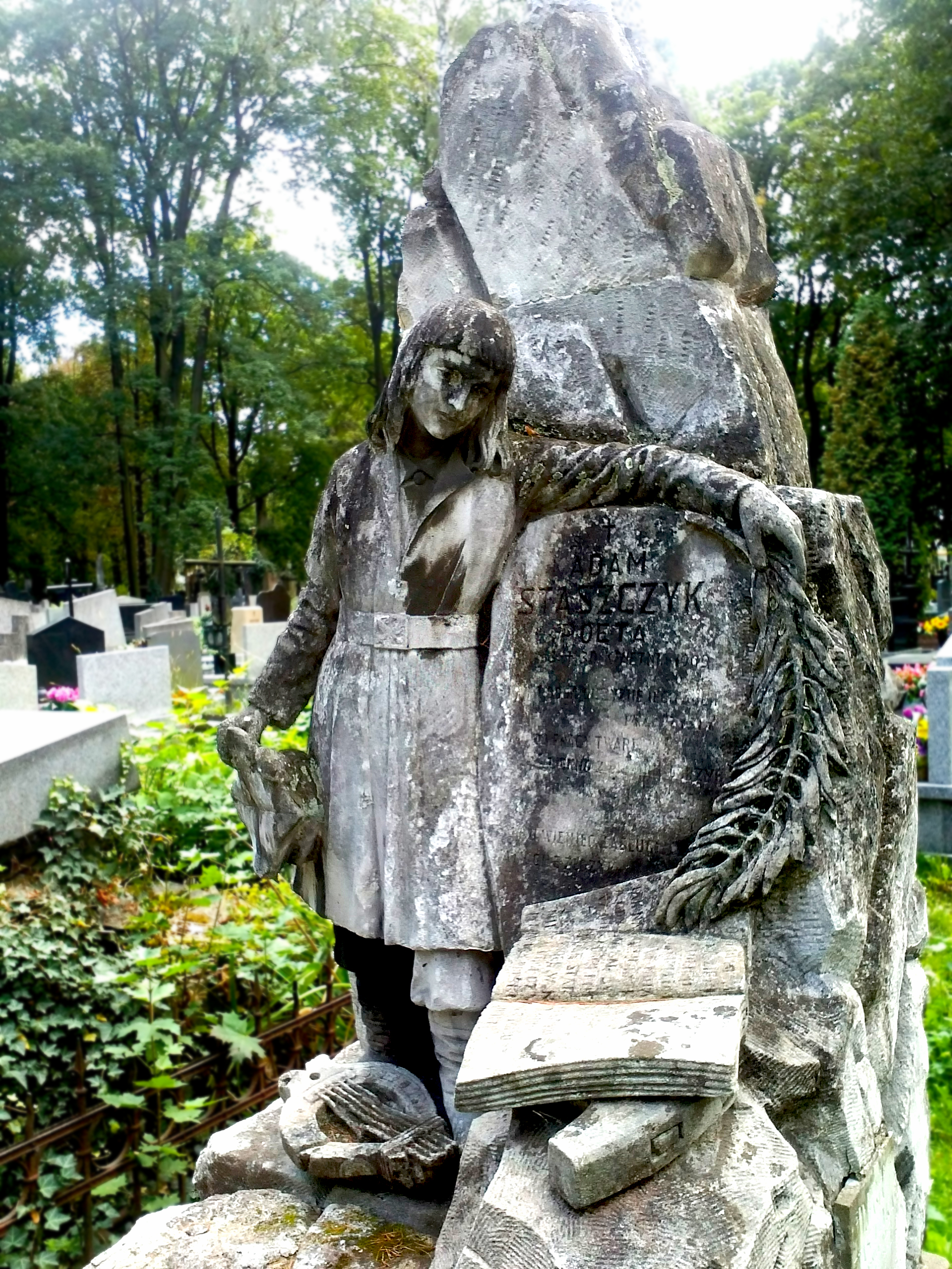 Rzeźba nagrobna Adama Stańczyka. Cmentarz Rakowicki, Kraków